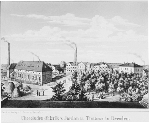 Lithographie der Schokoladenfabrik von Gottfried Jordan und August Friedrich Timaeus in Dresden-Neustadt.